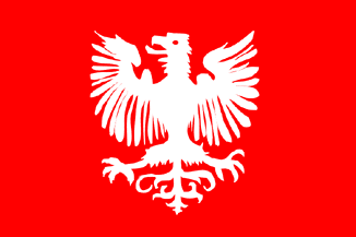 Tarentàsia